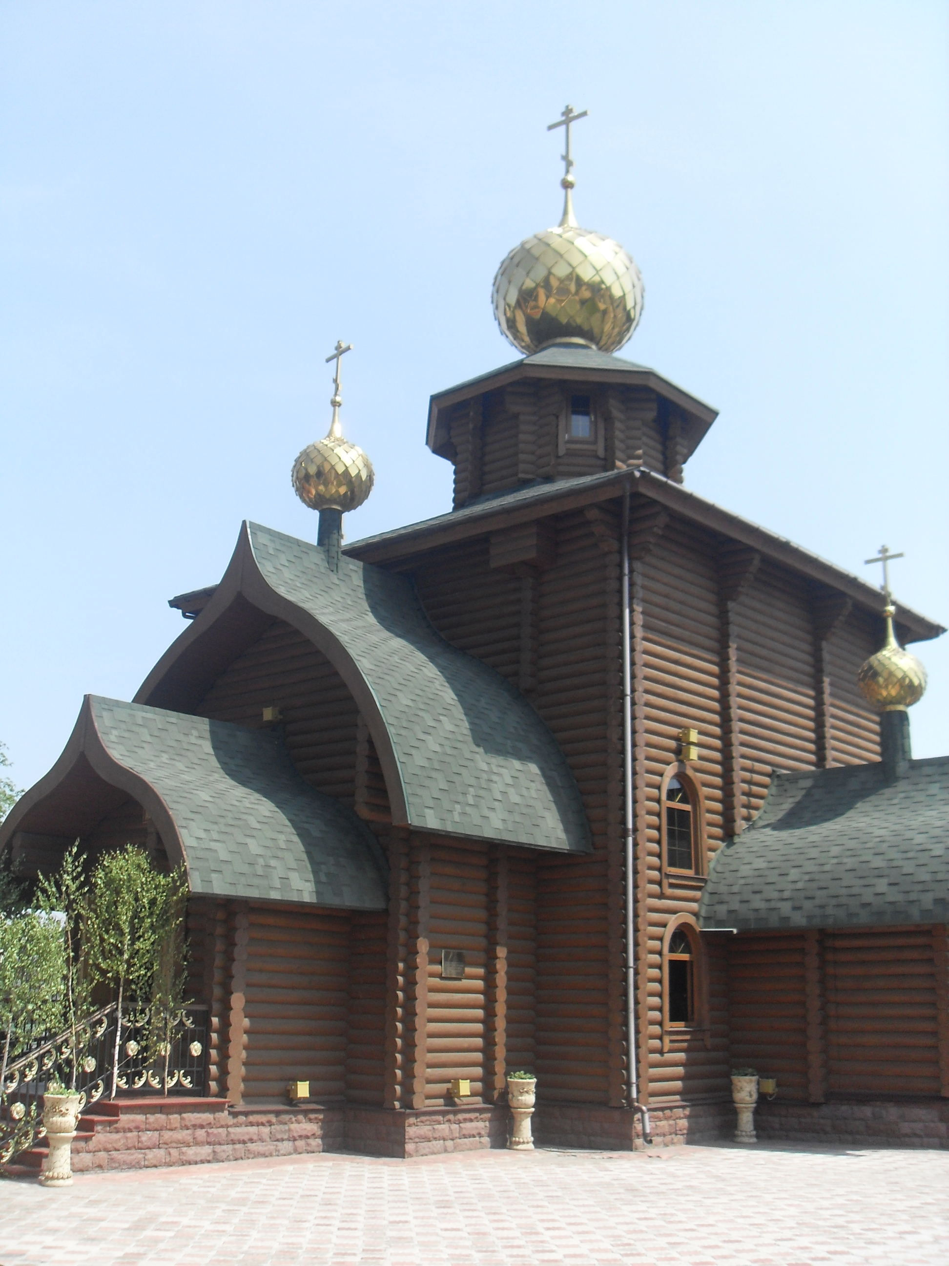 Церковь Святого равноапостольного Великого князя Владимира (г. Тула) построена к 70-летию АК «Туламашзавод» в 2009 г.